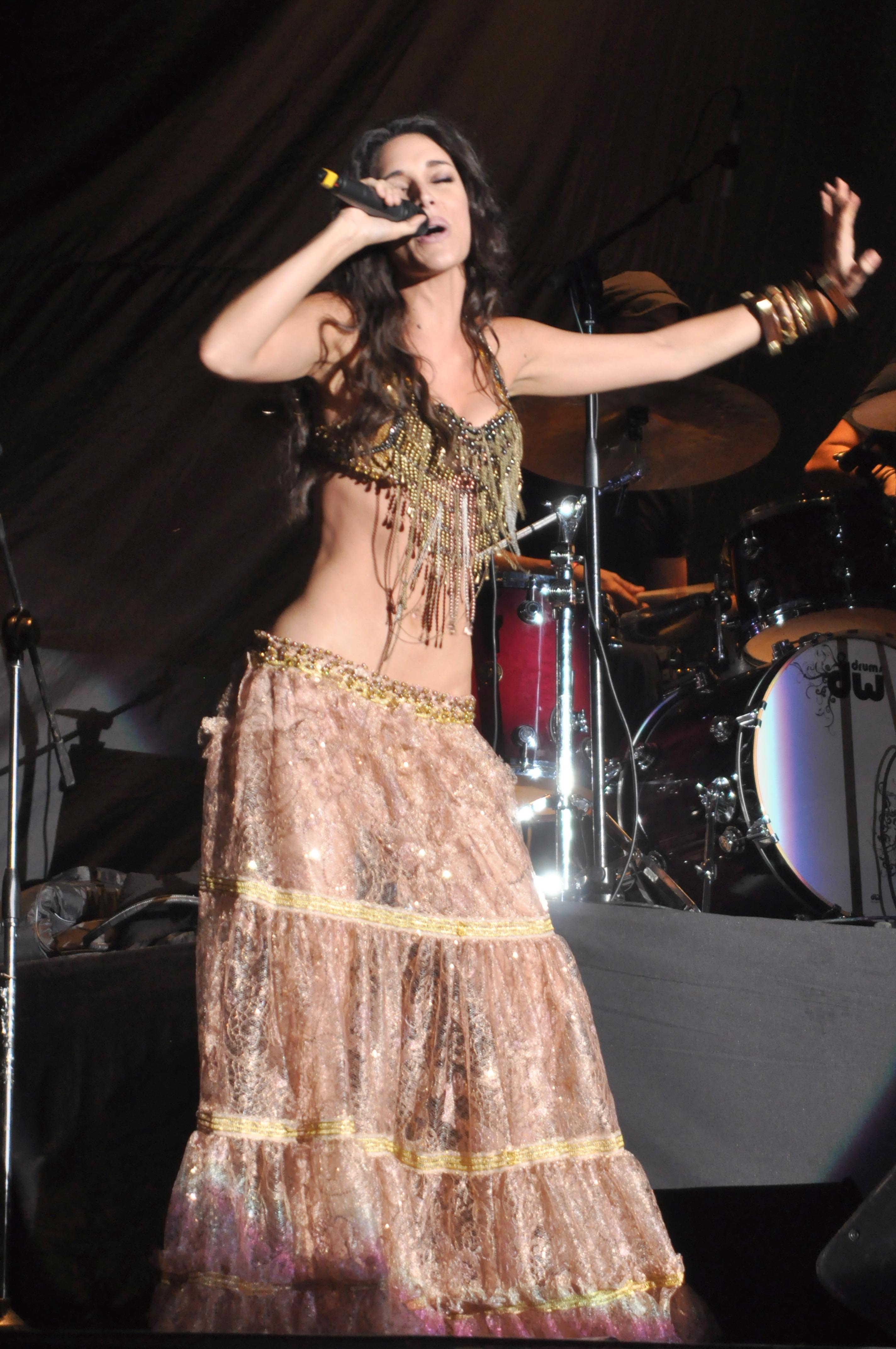 Modelo y cantante dominicana Amelia Vega.